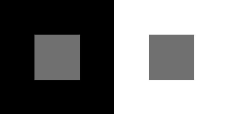 Simultaneous Contrast - Luminance